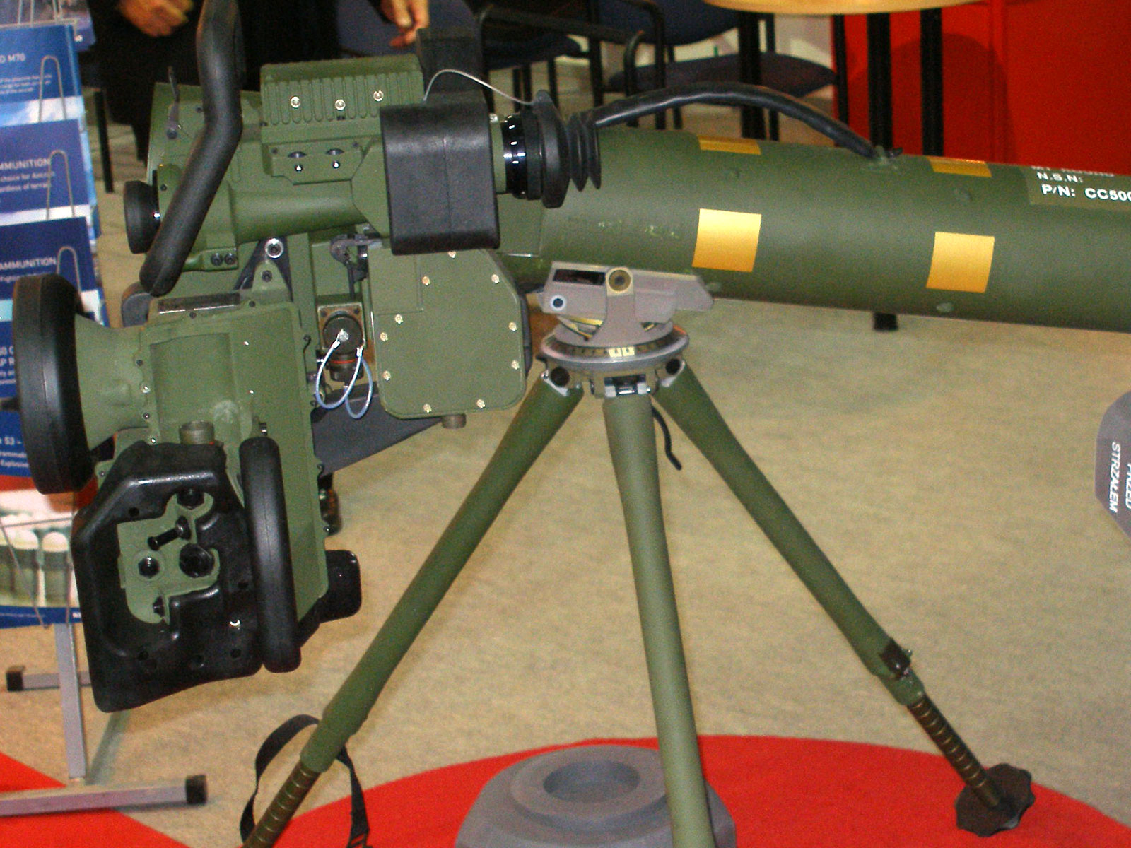 Wyrzutnia pocisków p.panc Spike.